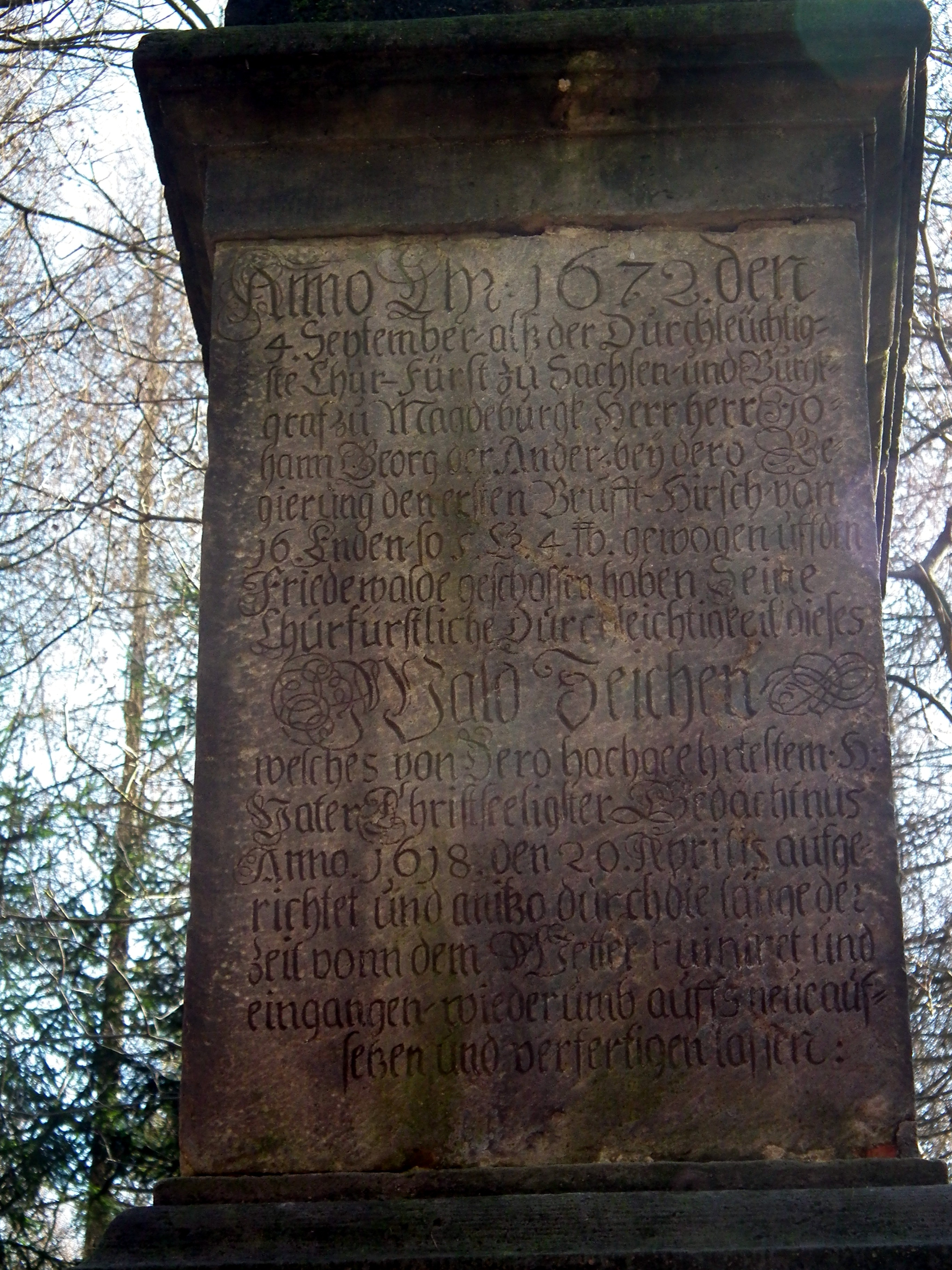 Wolfssäule Friedewald, Weinböhla, Sachsen, Deutschland